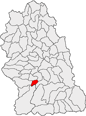 Categorie:Hărţi ale judeţului Hunedoara